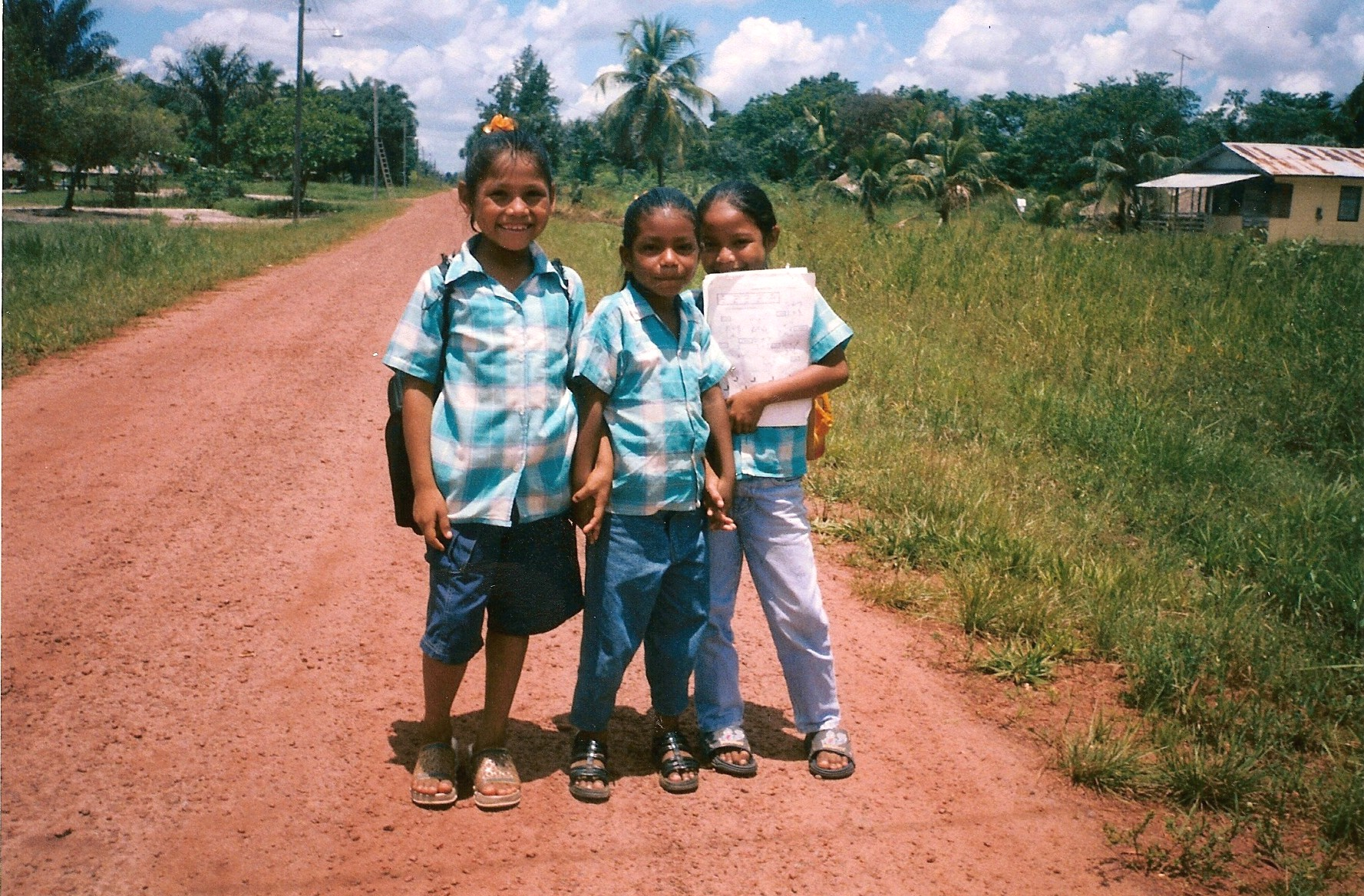 Schoolmeisjes in Bigi Poika. Eigen opname